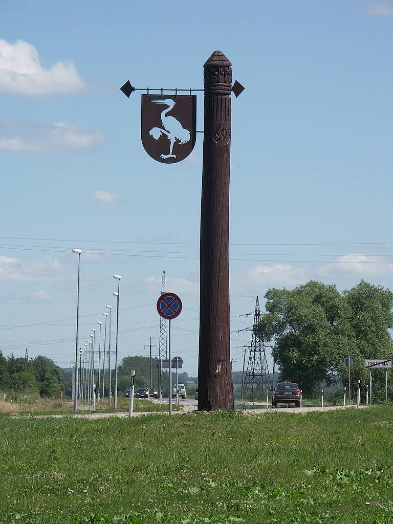 Герб Гробиня на выезде из городка